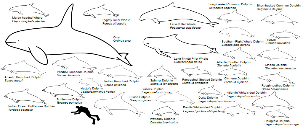 השוואה בין גודל דולפיניים לגודל אדם ממוצע